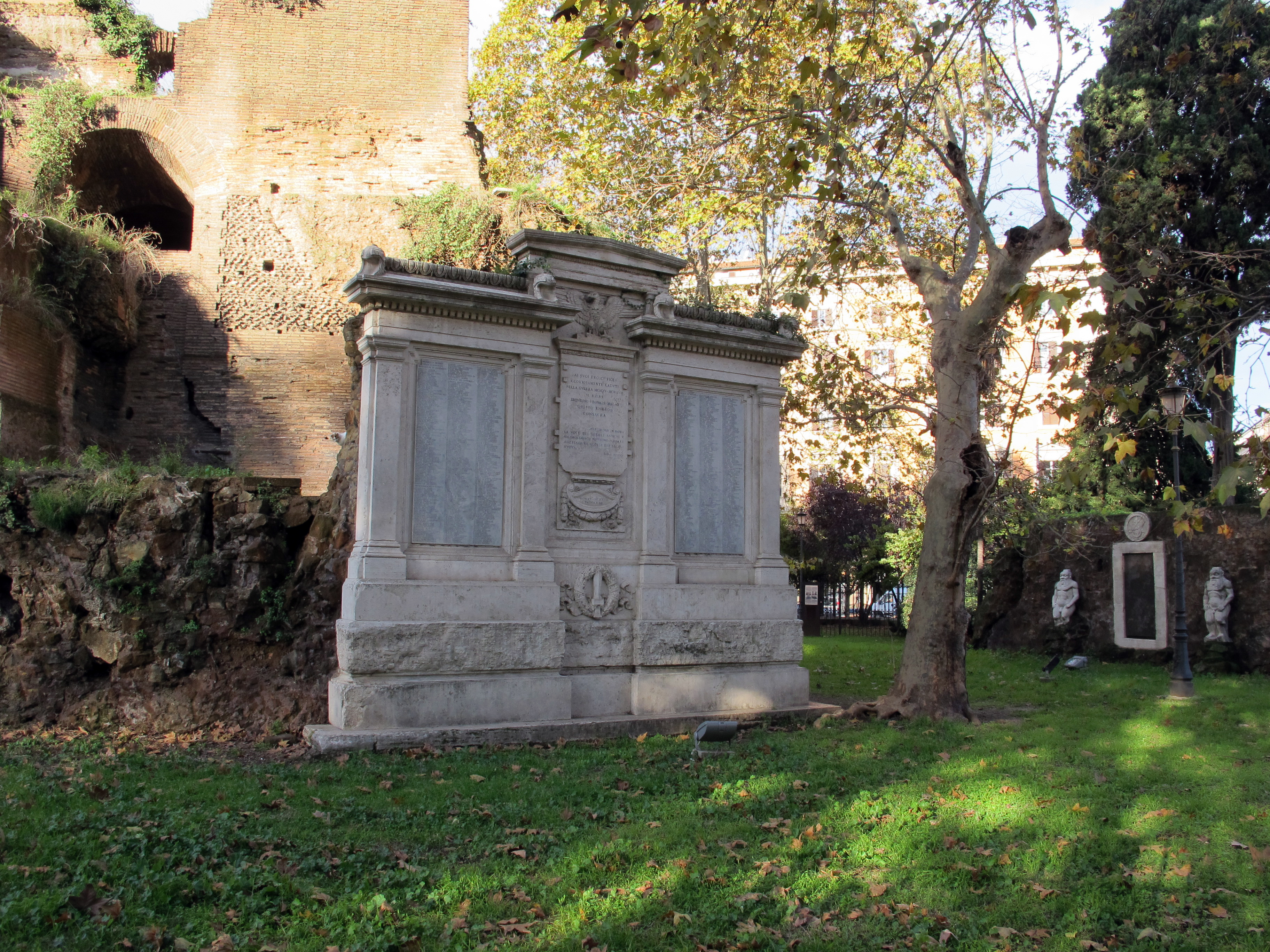 Roma, vedi titolo